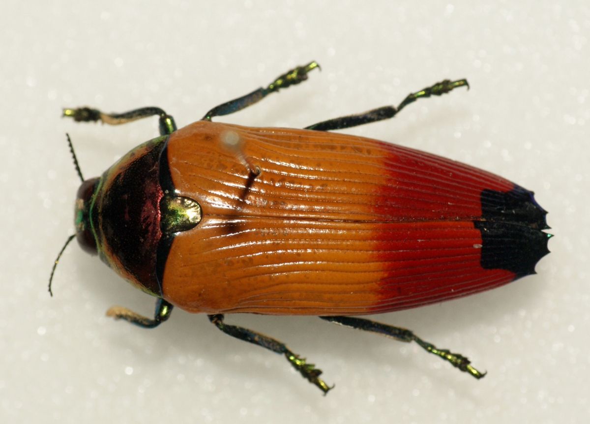 Buprestidae - In collection